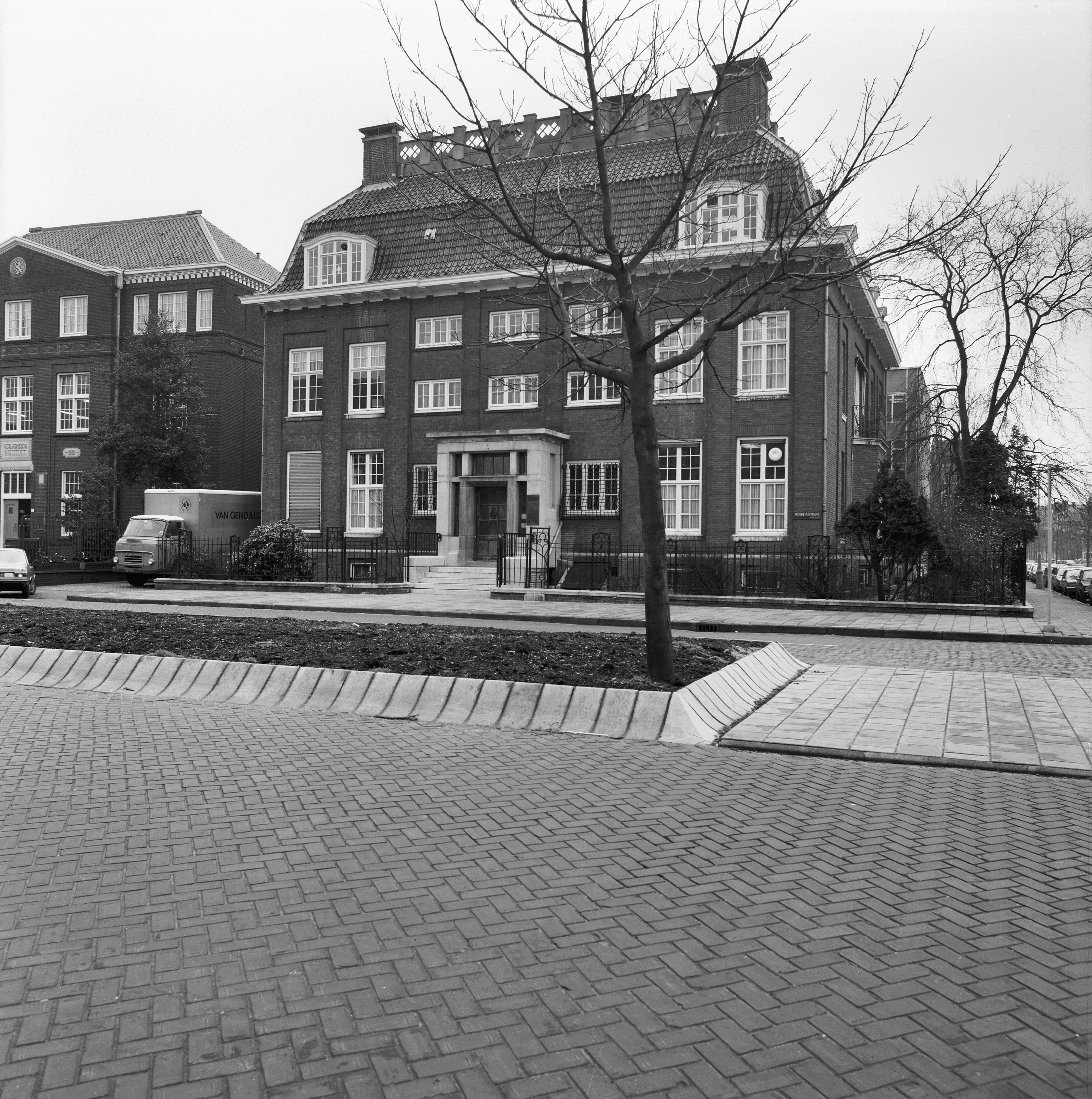 voorgevel